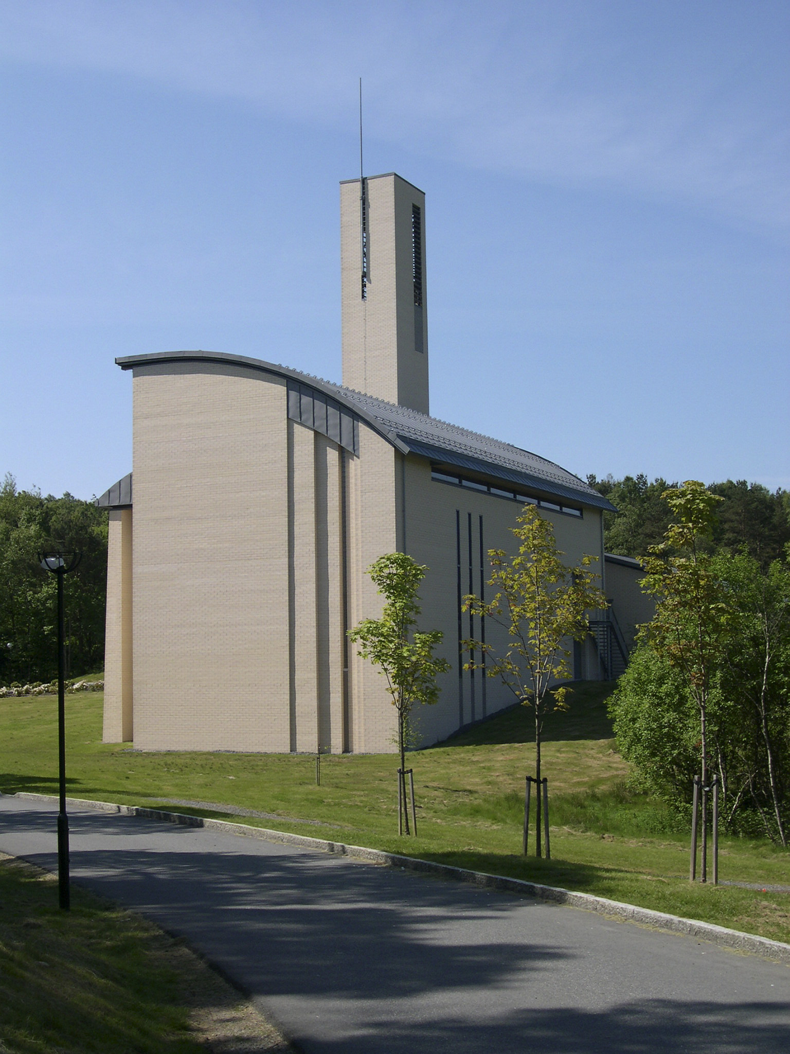 Sælen kirke. Foto: Oddbjørn Sørmoen, fra Kulturminnebilder.no.